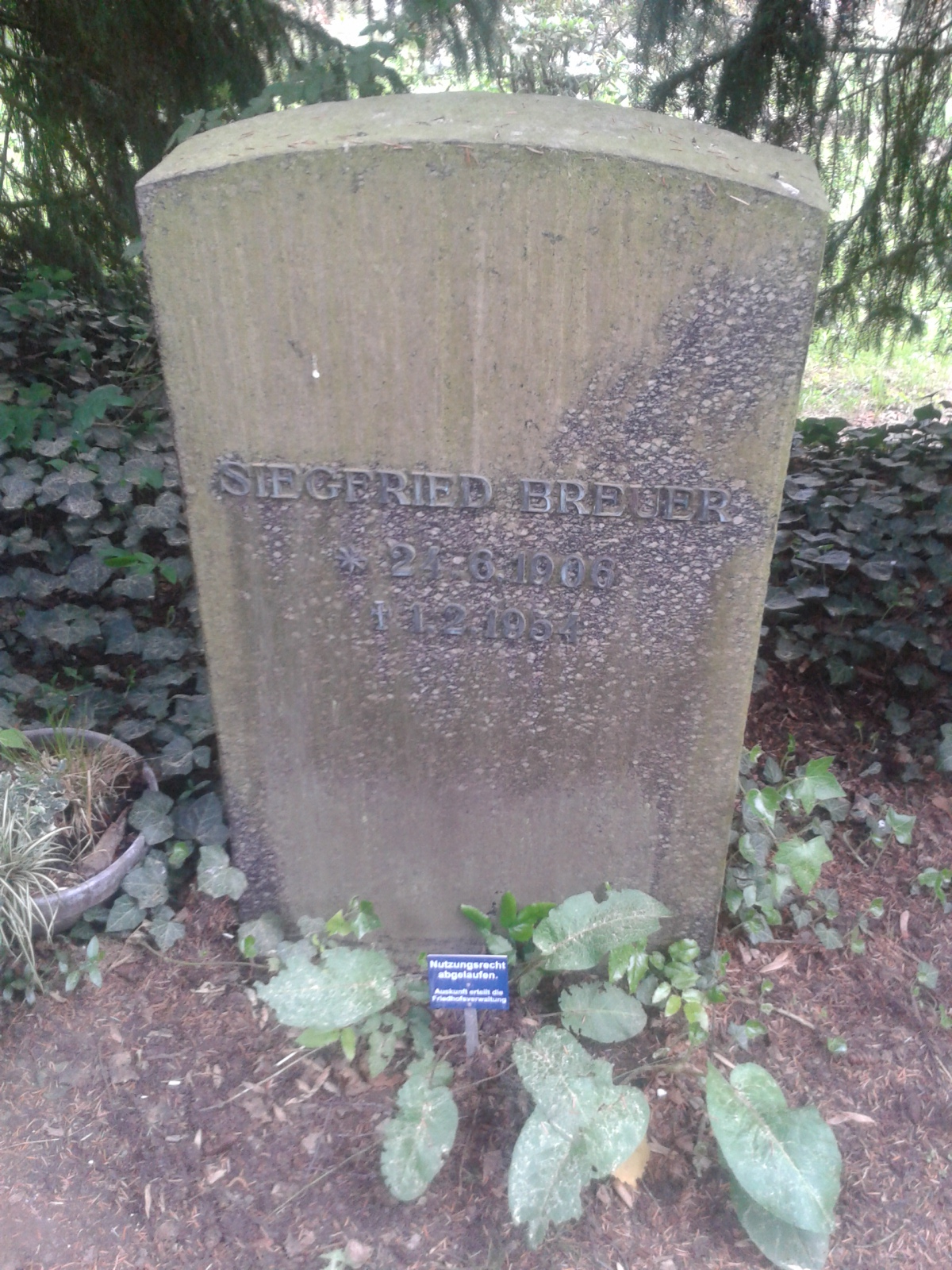 Grabstein, Siegfried Breuer, Göttinger Stadtfriedhof